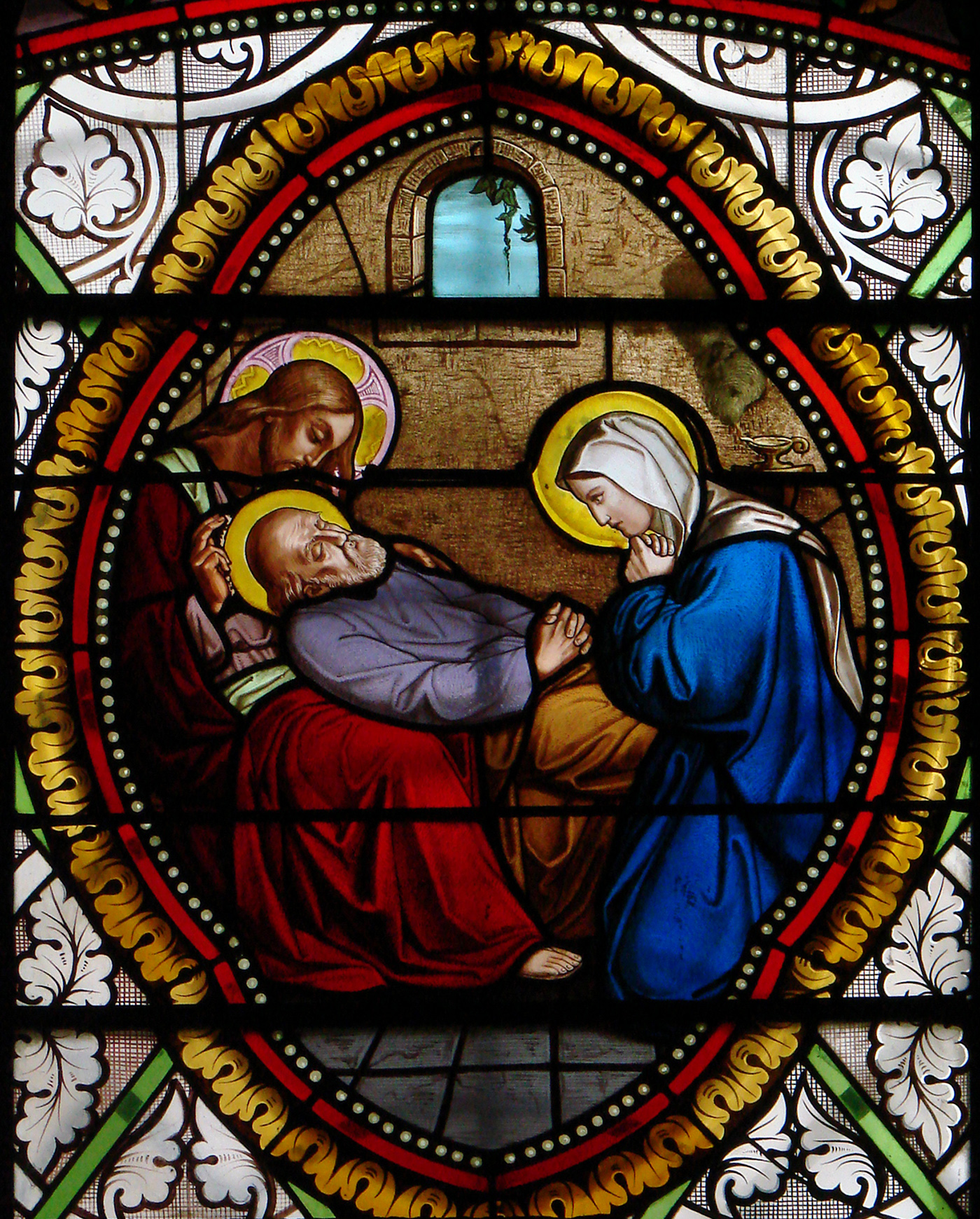 Vitrail néogothique dans l'église Saint-Martin de Florac: la mort de Saint Joseph.